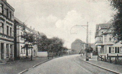 Dortmund-Bövinghausen um 1900